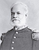 foto do Marechal José Simeão de Oliveira